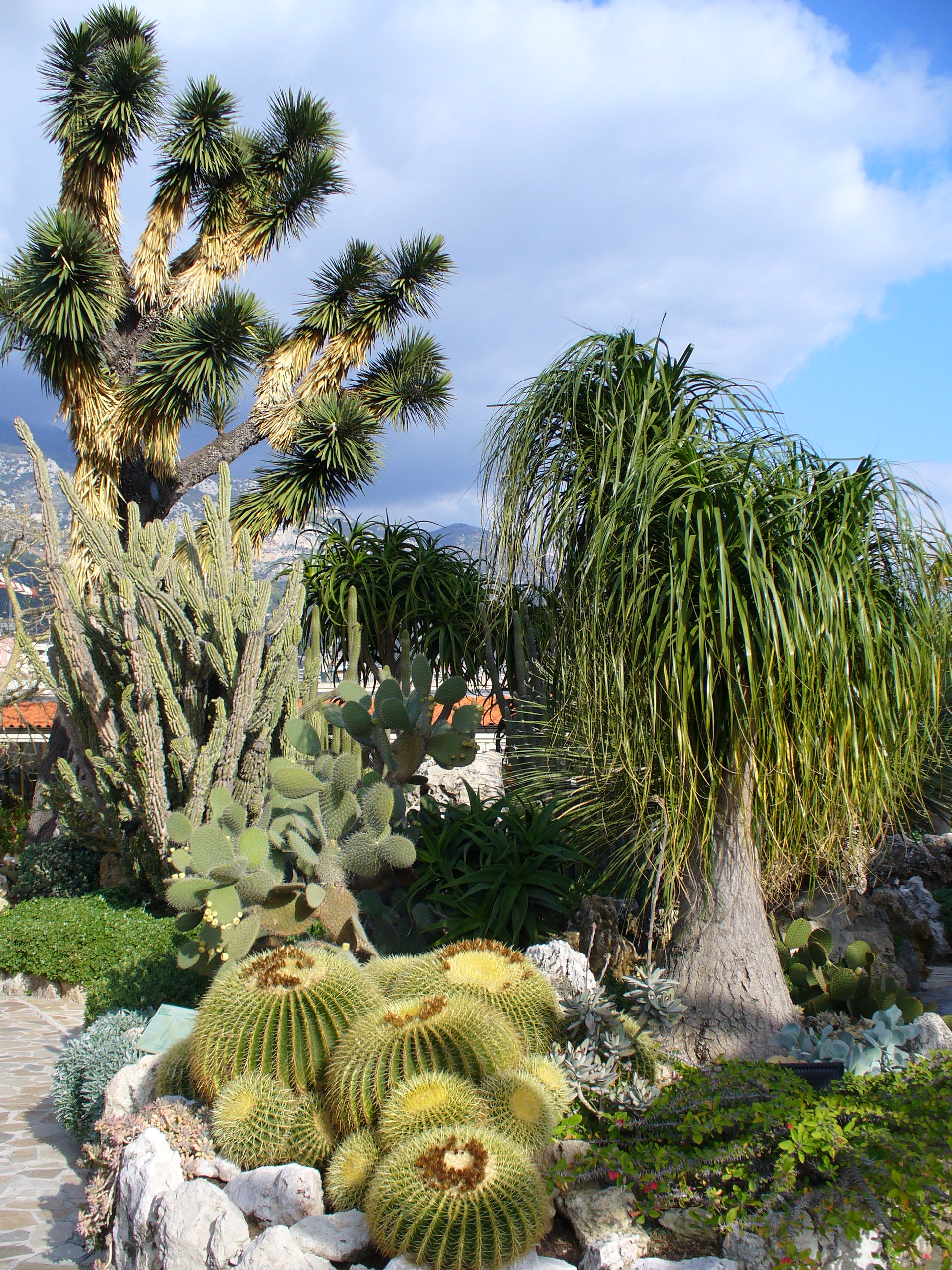 Jardin exotique de Monaco